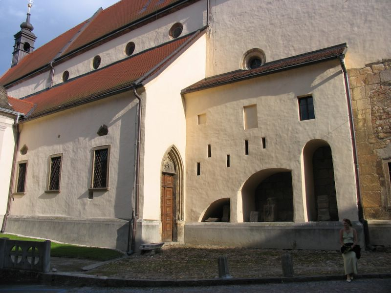 Cerkev sv. Jurija